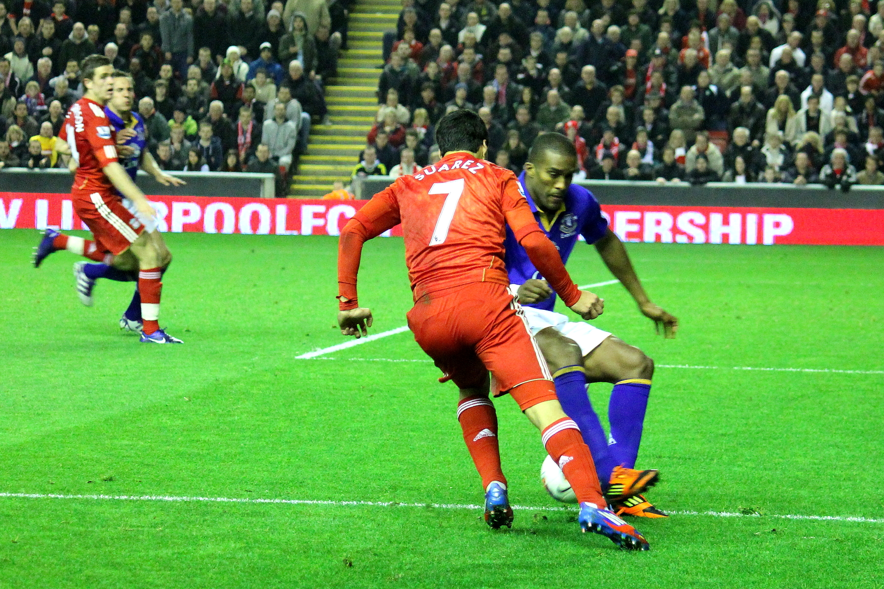 Luis Suarez runs at Distin during Merseyside Derby in 2012.